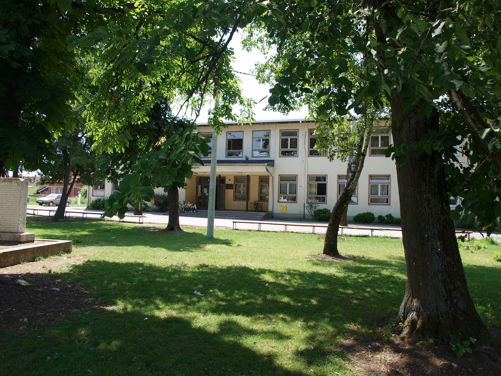 Osnovna škola "Viktor Car Emin" u selu Donji Andrijevci, Brodsko-posavska županija.